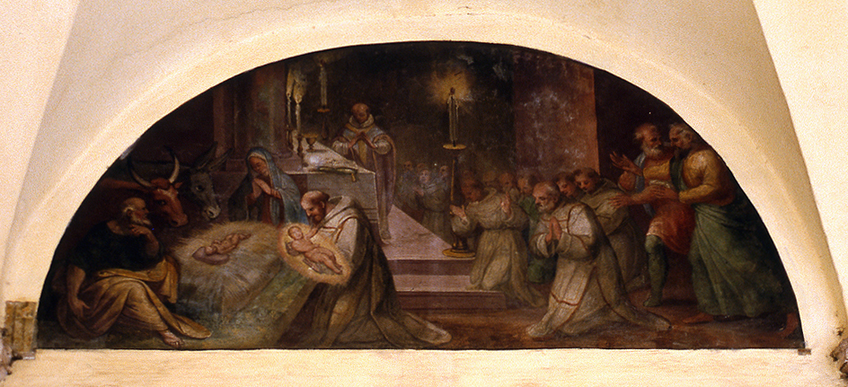 Detall del cicle de frescos dedicat a la vida de Sant Francesc d'Assisi